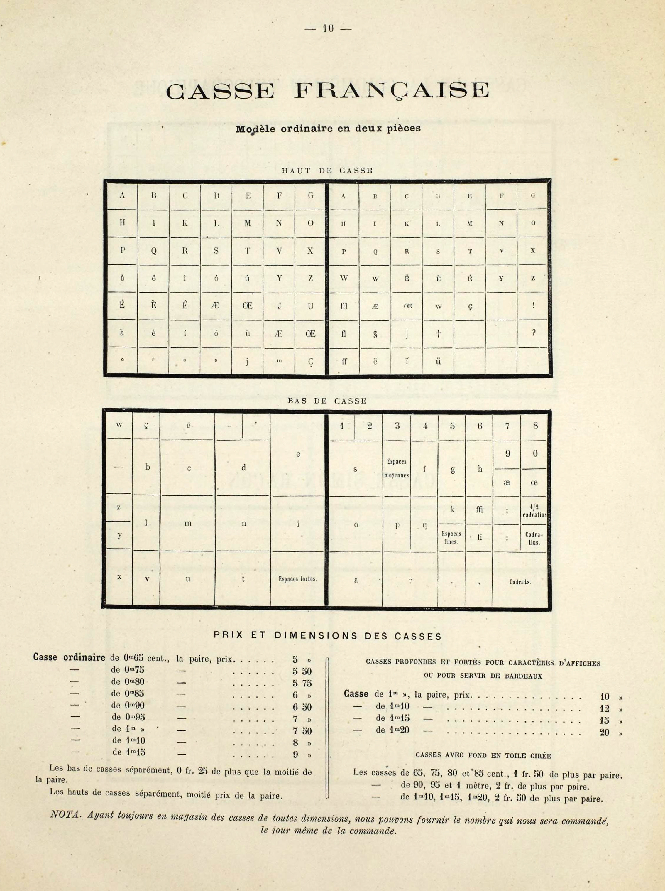 Catalogue Boildieu